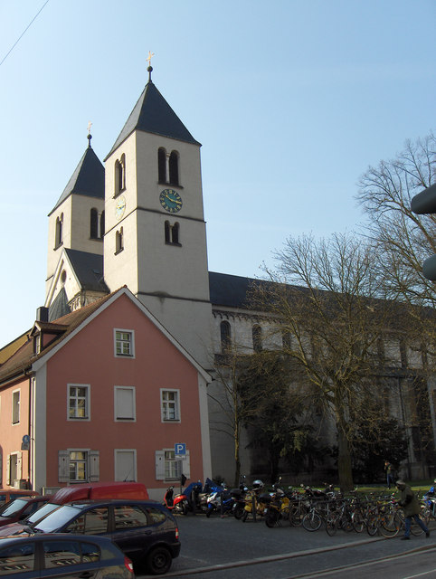 Schottenkirche St. Jakob in Regensburg, near to Regensburg, Deutschland (Zone 33). Erbaut um 1100.